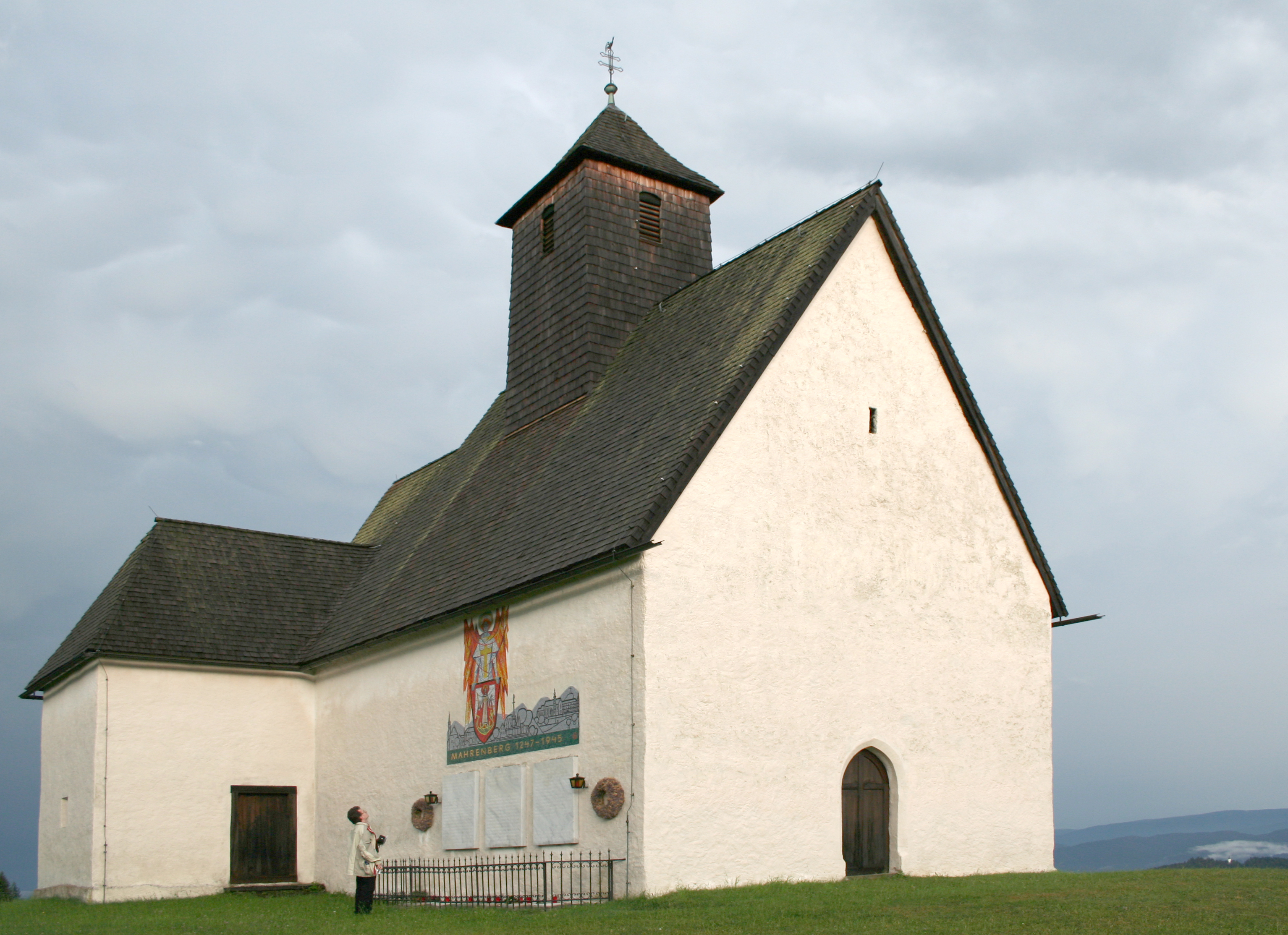 Katholische Filialkirche St. Leonhard in der Ebene